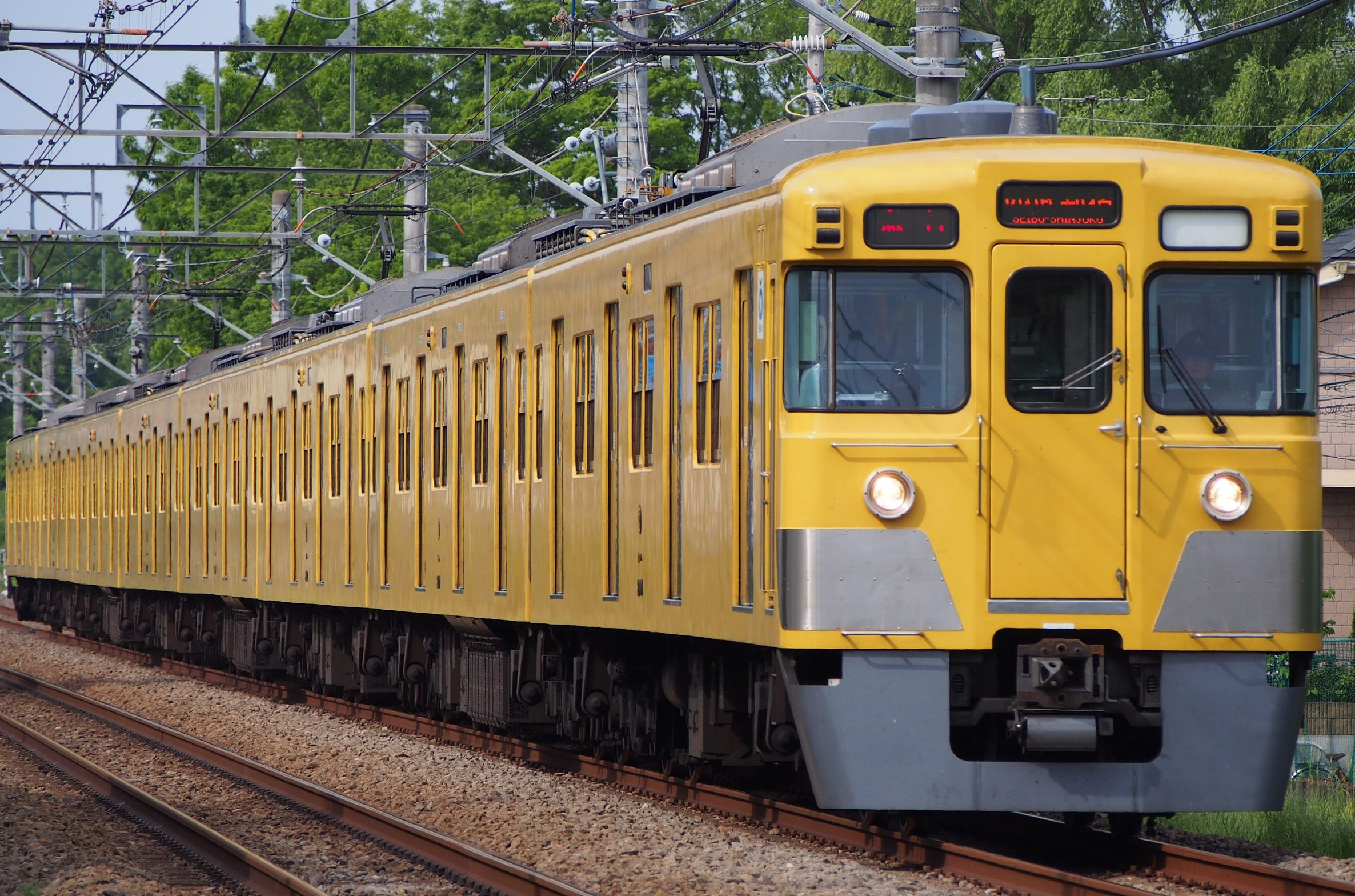 急行西武新宿行き